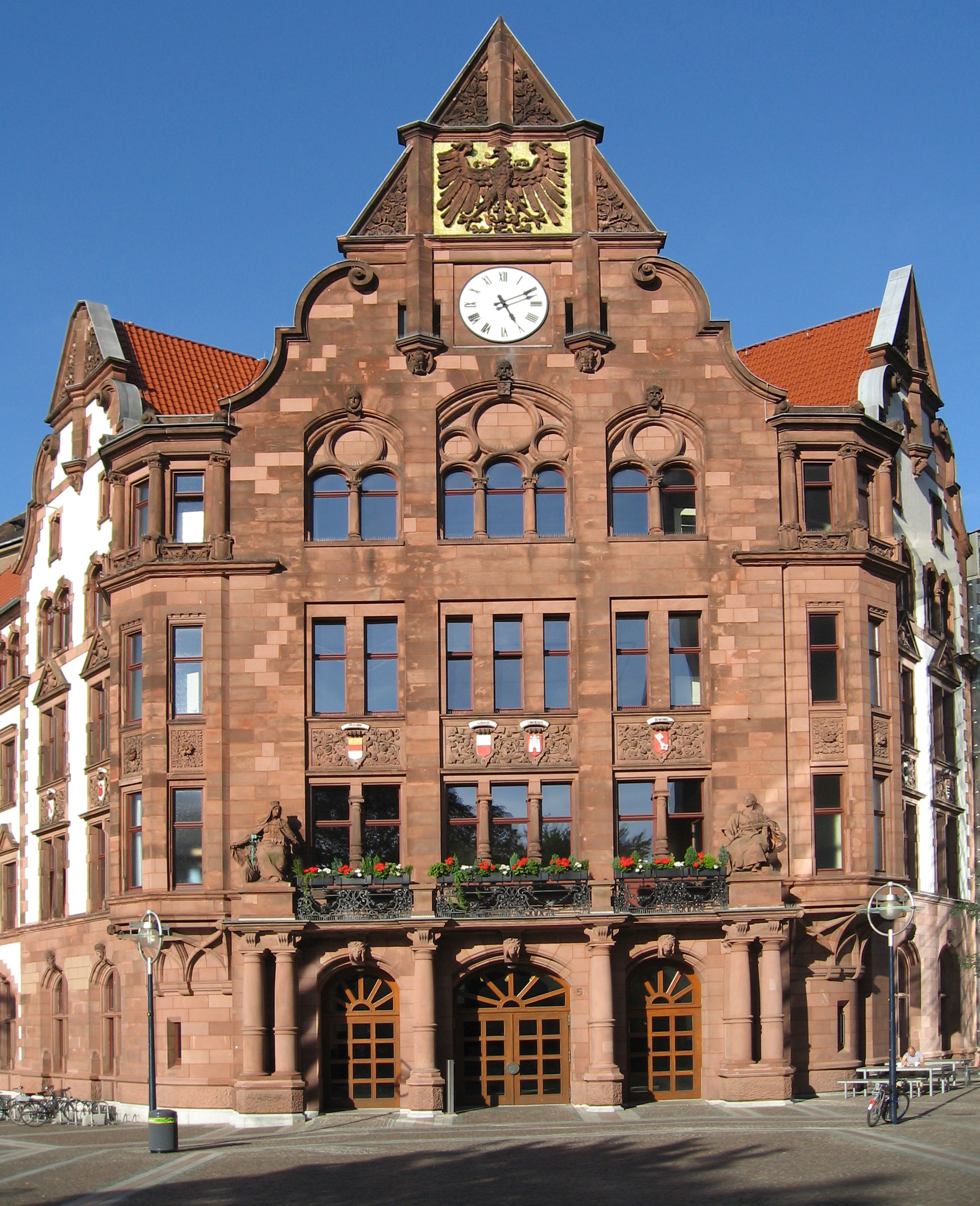 Dortmund, Friedensplatz, Altes Rathaus, Südwestportal